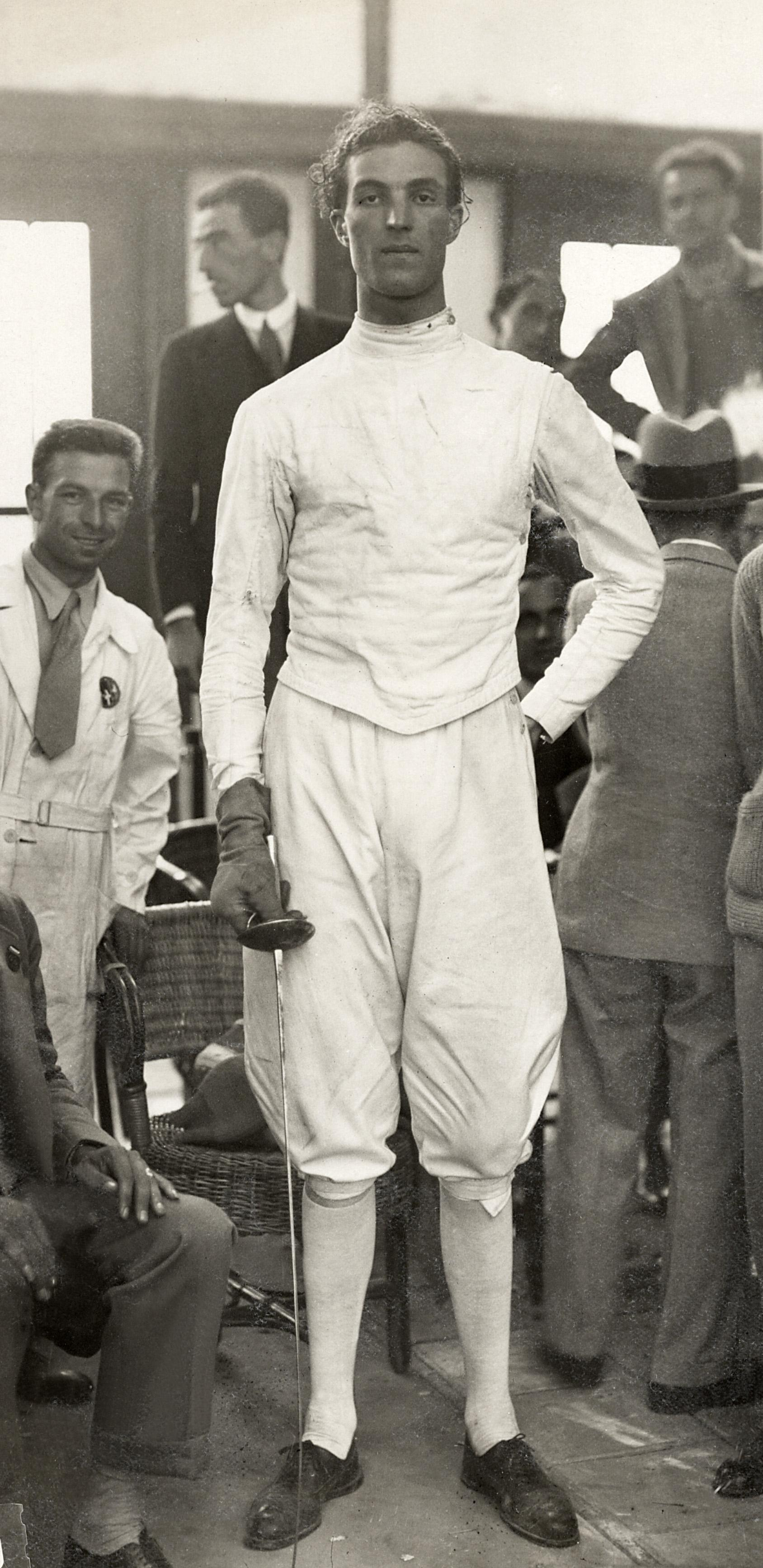 Sport. Olympische Spelen 1928 Amsterdam, Nederland. Schermen, heren, floret: Italiaanse schermer G. Gaudini, winaar van brons en goud.